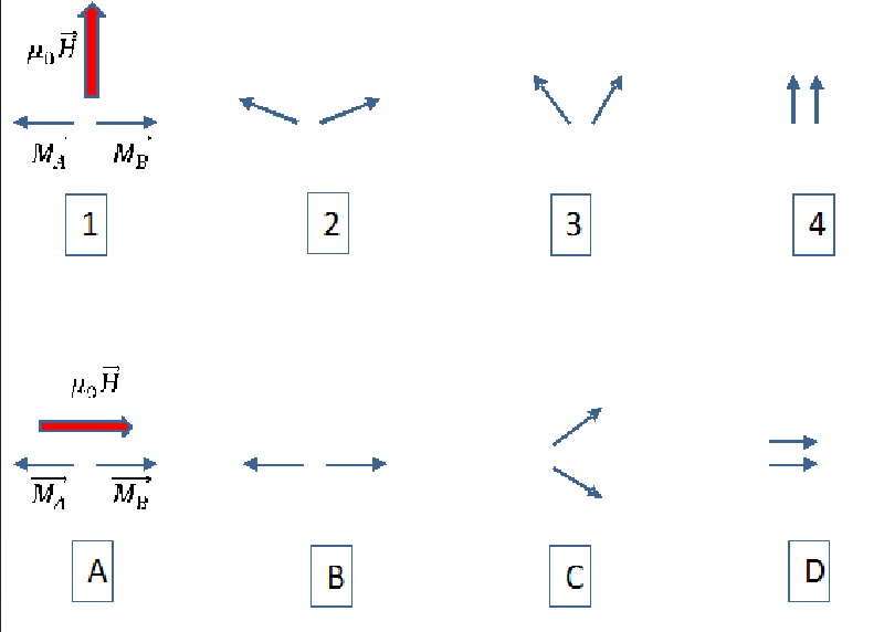 Aimantation en fonction du champ initialement perpendiculaire (en rouge) et parallèle (en noir)